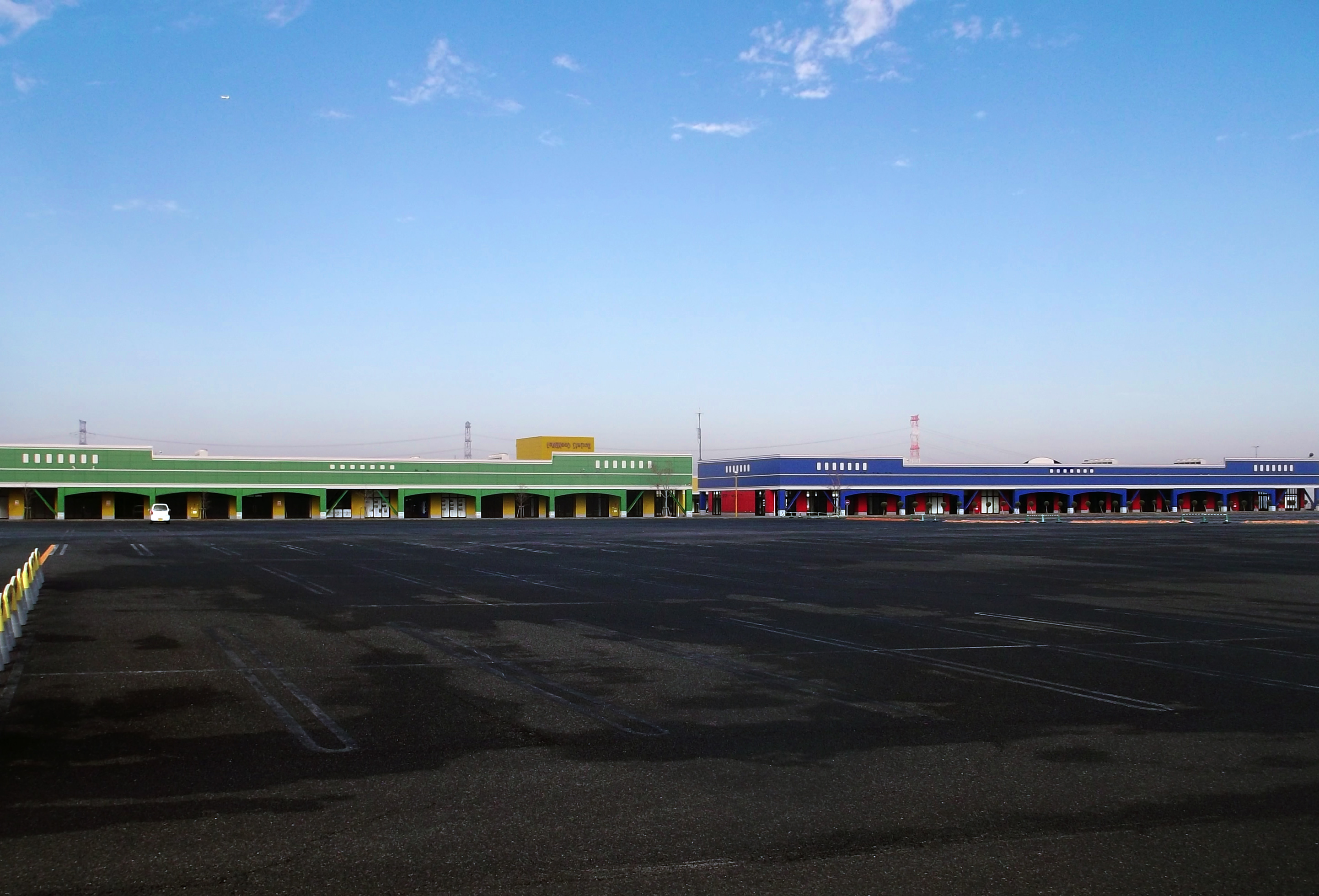 千葉県長生郡長柄町に所在するロングウッドステーション